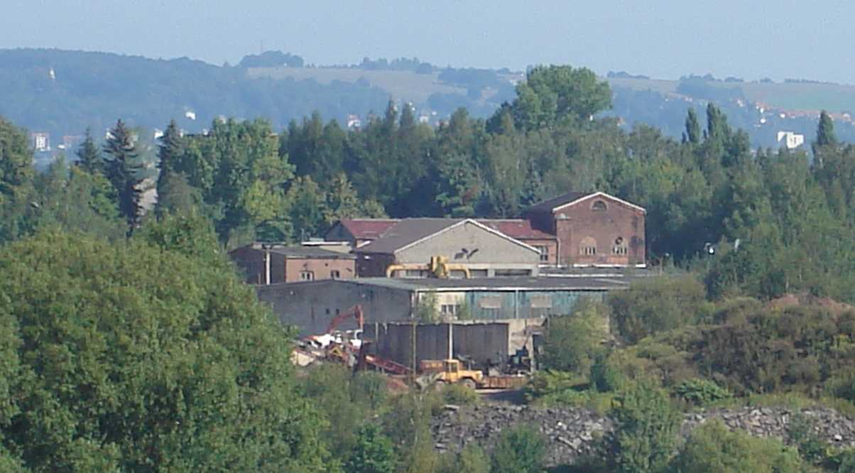 Gebäudereste des Merkurschachtes